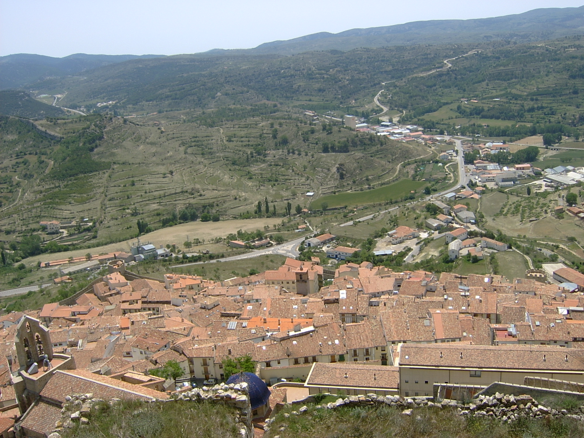 Vista panorámica de Morella desde su castillo.